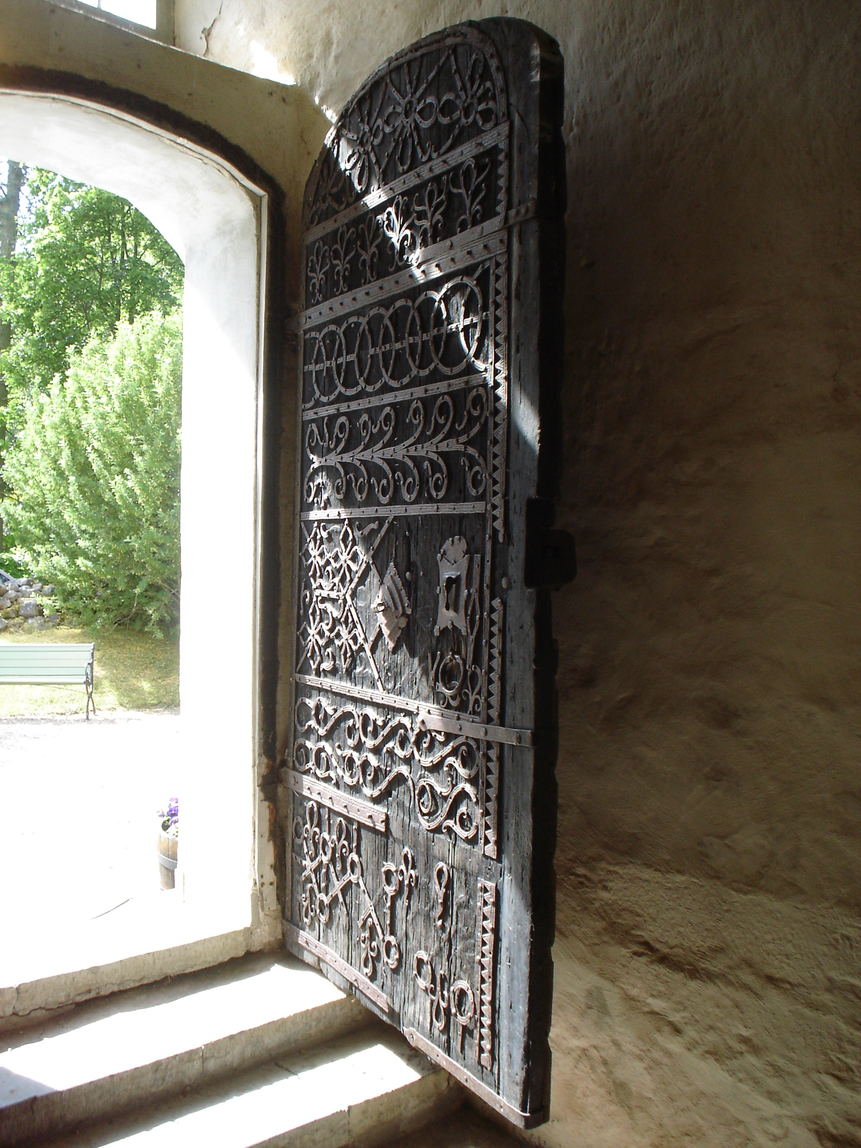 Bjälbo kyrkport, Östergötland, 15 juni 2006 Fotograf: Gamnacke